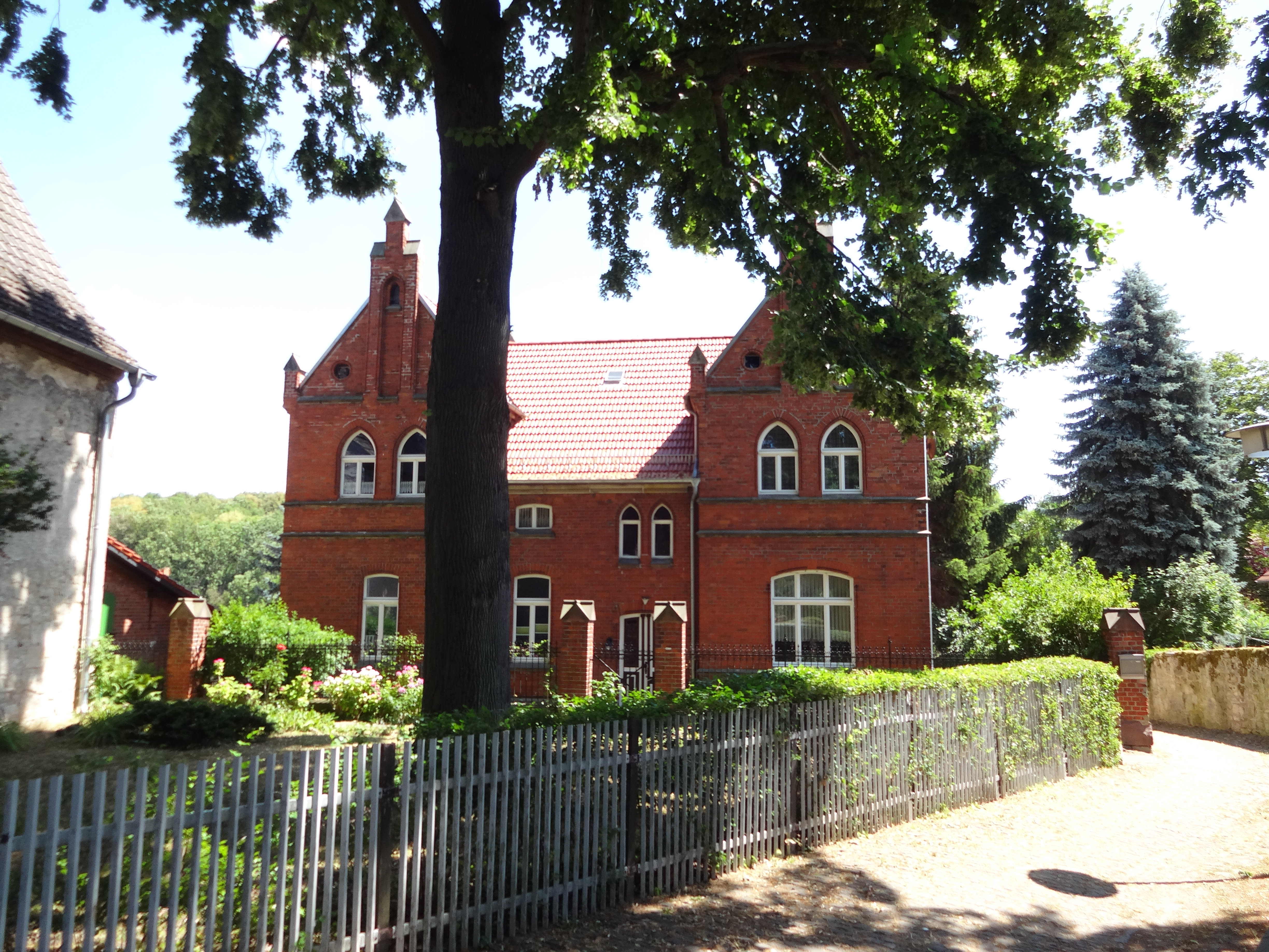 denkmalgeschützter Pfarrhof im Kirchplatz 122 in Vogelsdorf (Gemeinde Huy)